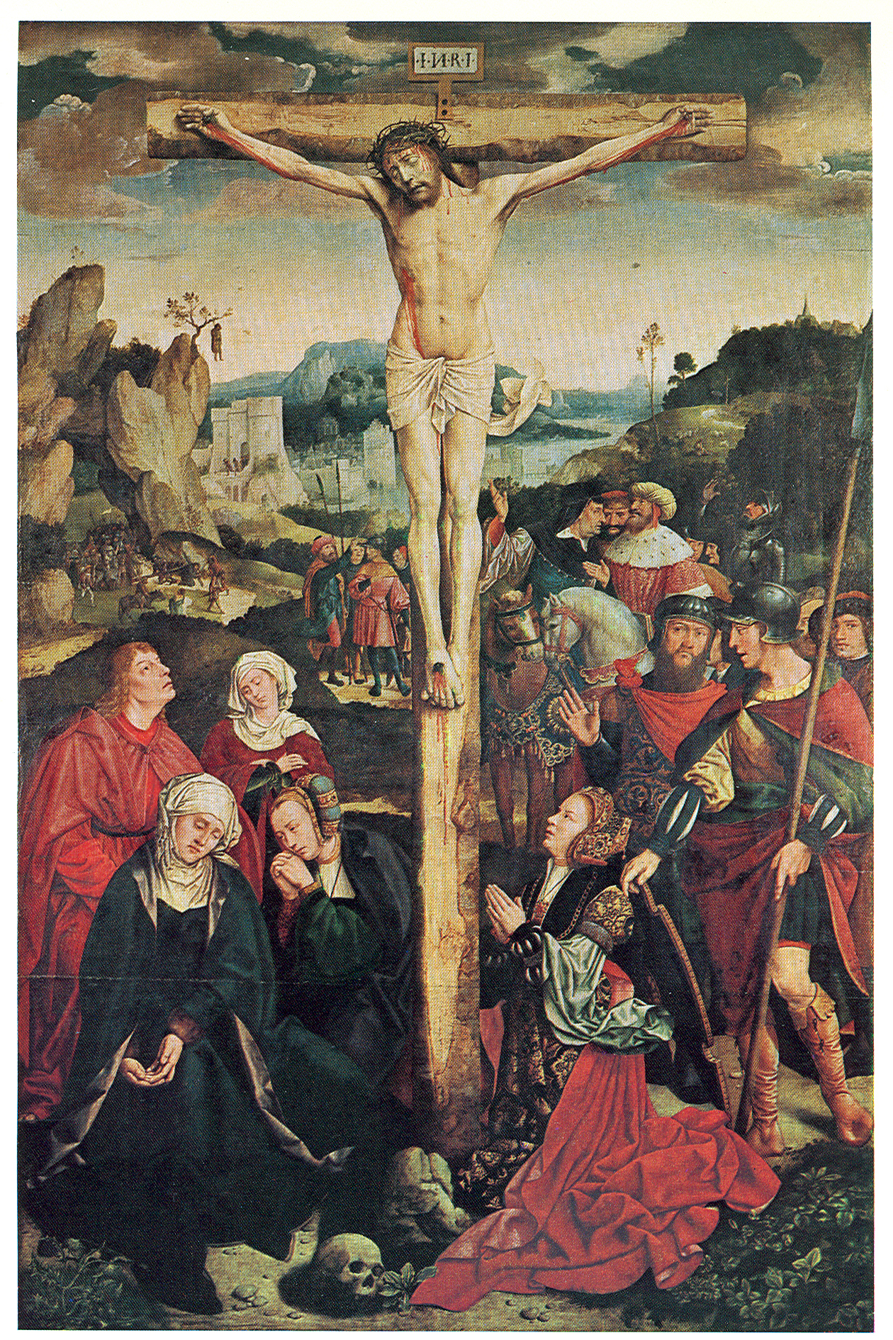 Altartafel